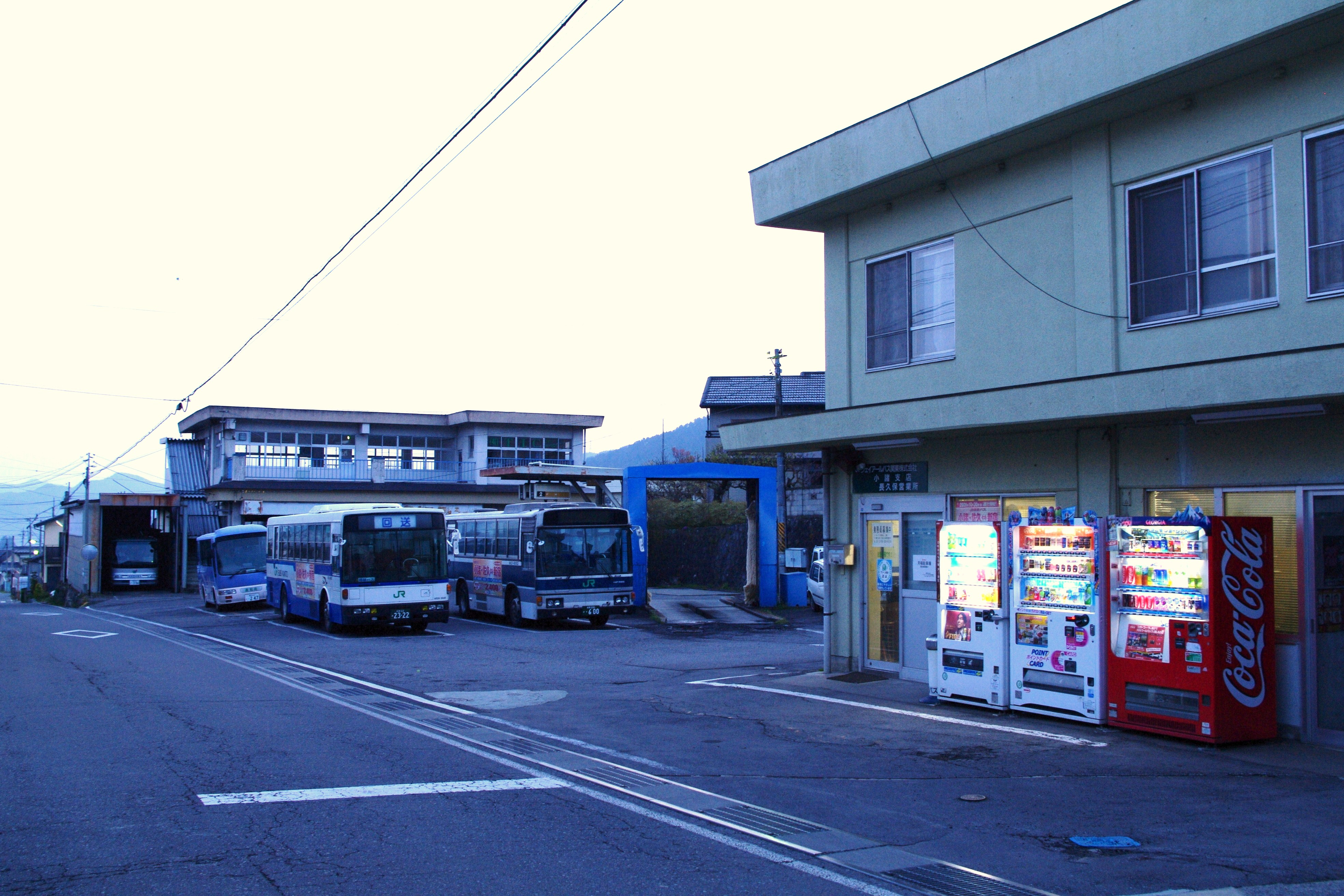 ジェイアールバス関東長久保営業所